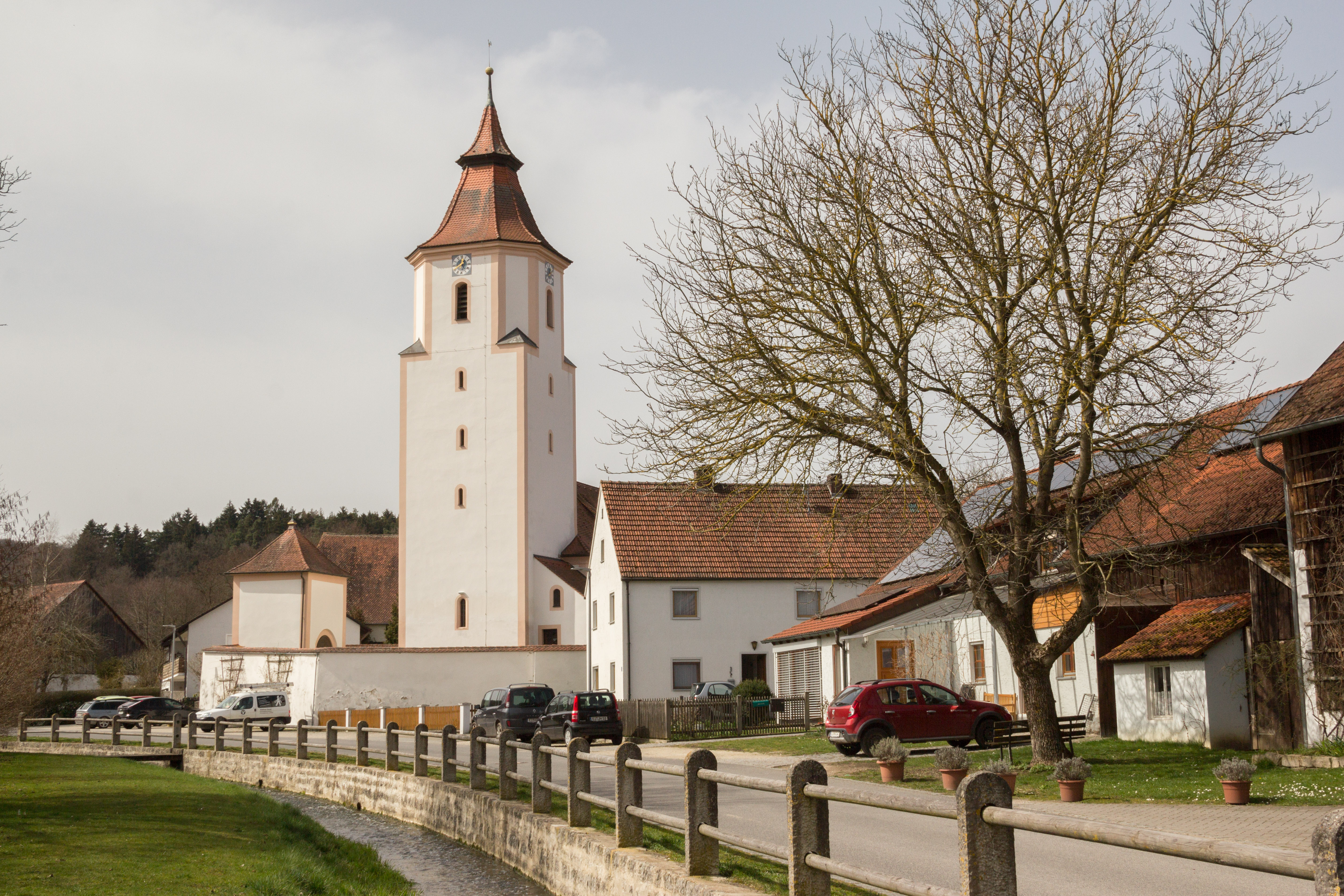 Biberbach, Ortsansicht